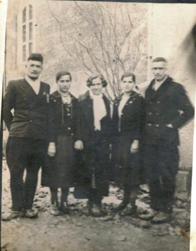 Тодор Христакиев, Монка Русева, Райна Илиева, Мона Иванова и Троян Господинов в края на кампания в село Юпер, 29 януари 1938.